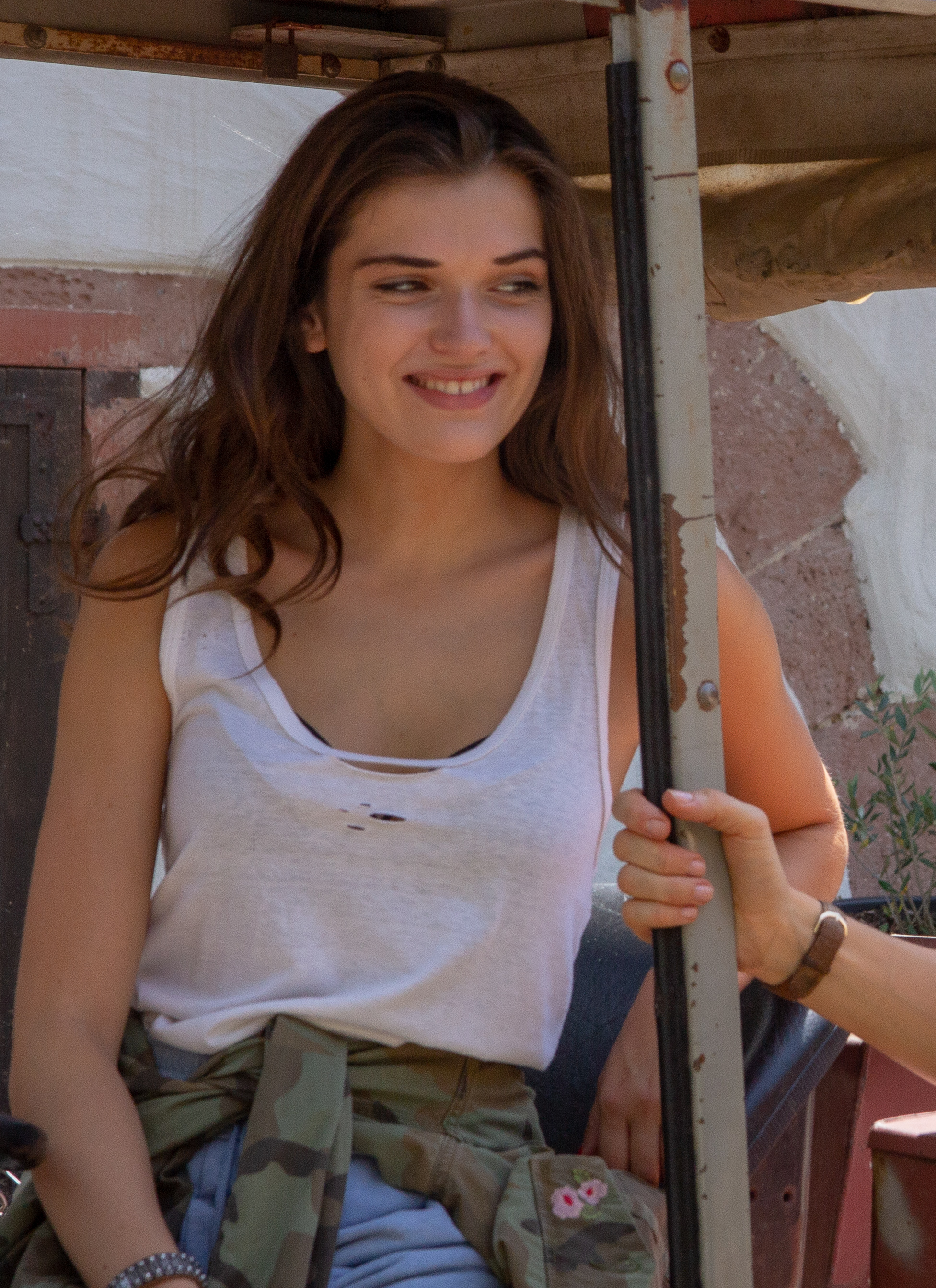 Foto- und Interviewtermin am Set von „Weingut Wader - Das Familiengeheimnis".